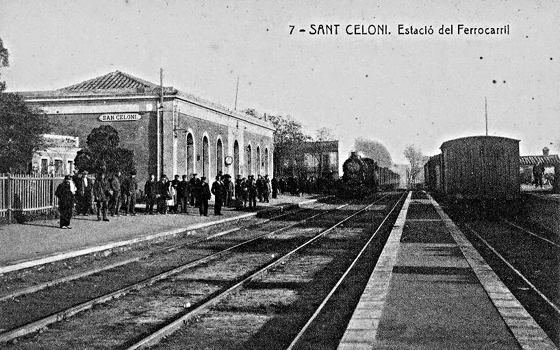 Estacio de ferrocarril de Sant Celoni a principis del segle XX